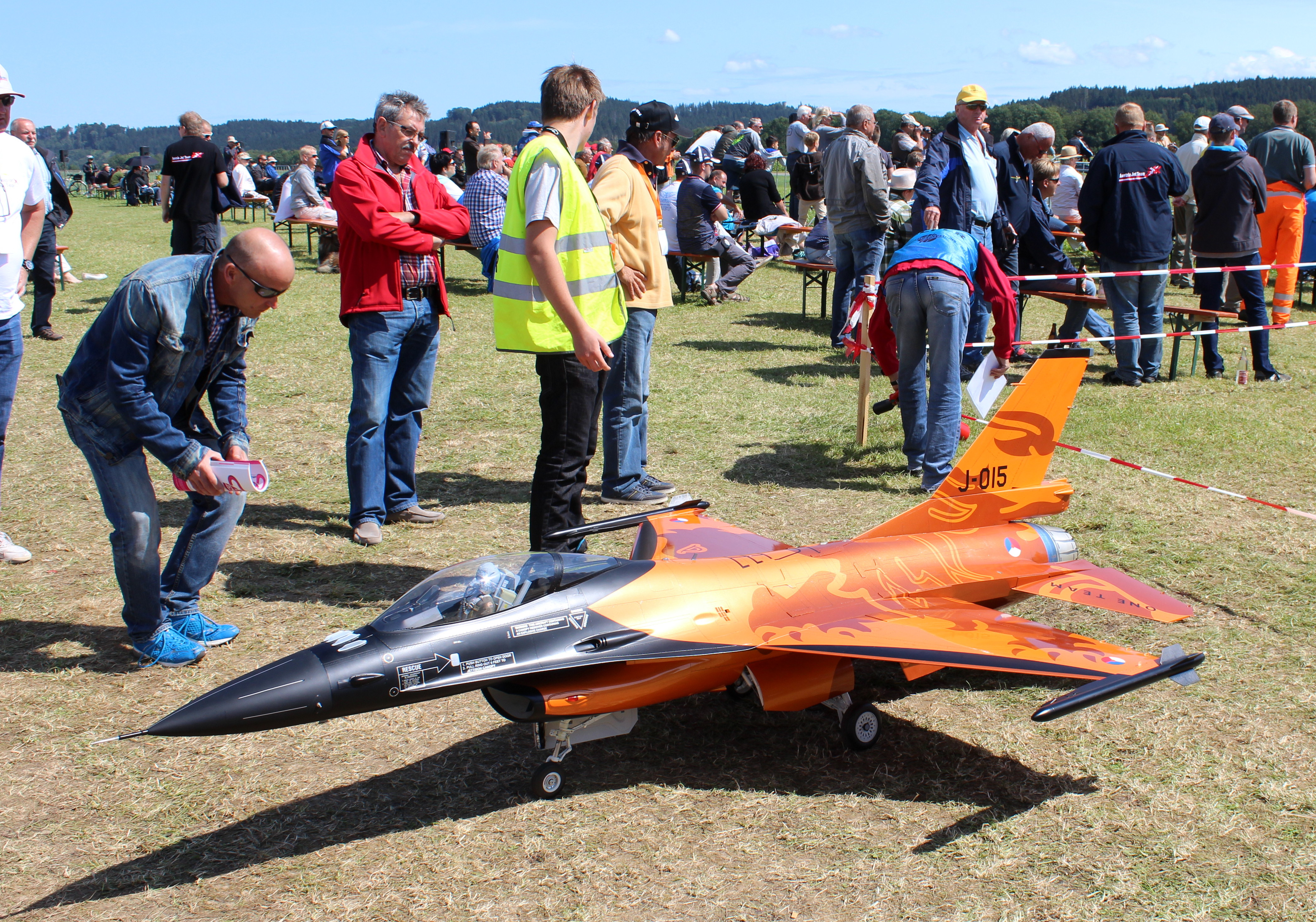 88299 Leutkirch im Allgäu, Germany